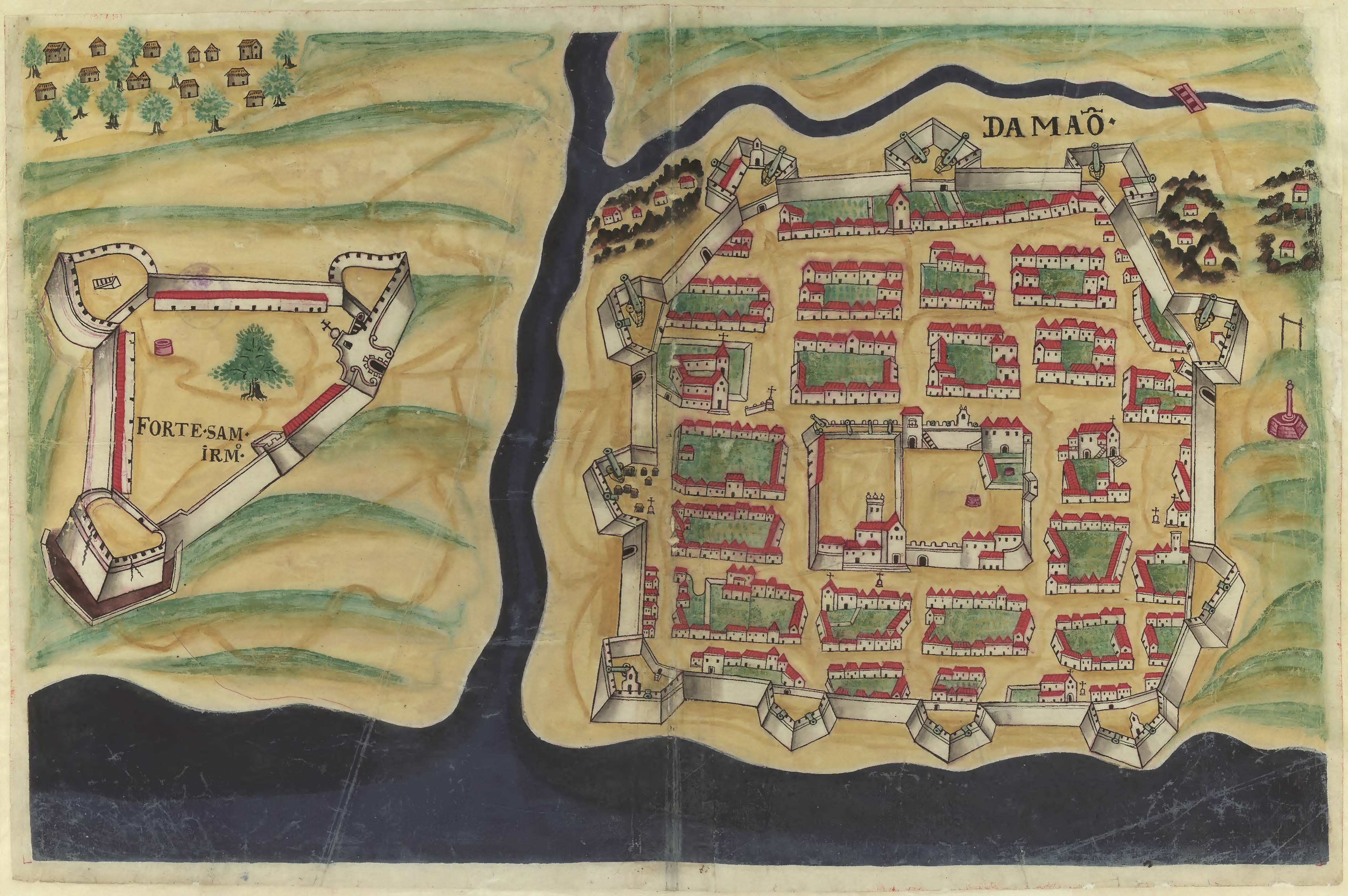 "Damão", Índia. Desenho, a cores. RESENDE, Pedro Barreto de. In: BOCARRO, António. "Livro das Plantas de todas as fortalezas, cidades e povoaçoens do Estado da Índia Oriental". Goa, 1635. Manuscrito na Biblioteca Pública de Évora, Portugal.